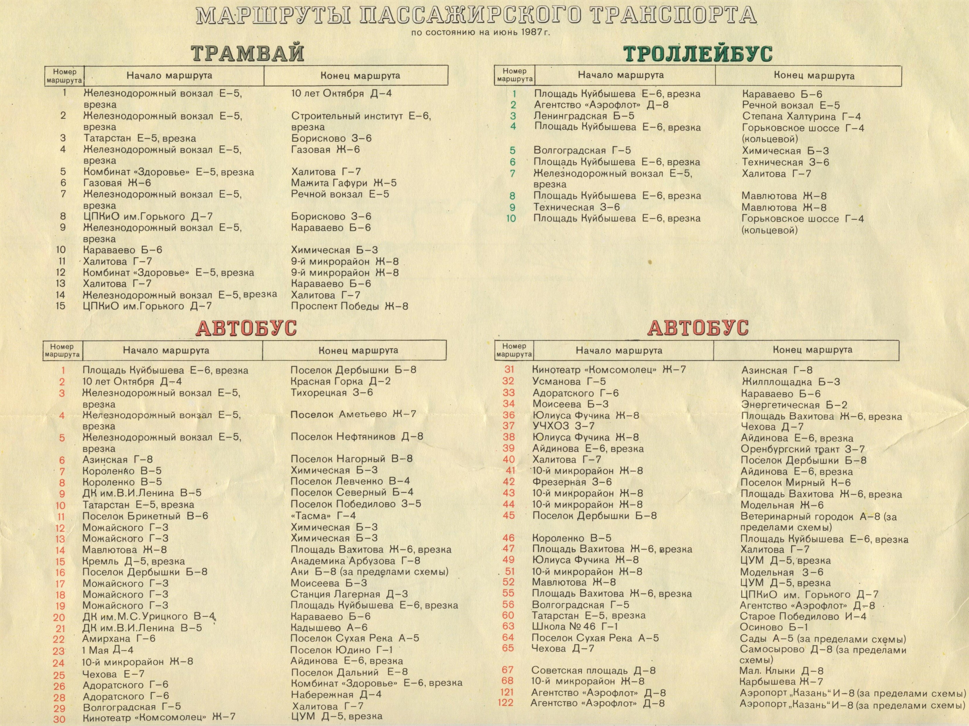 Казань. Маршруты пассажирского транспорта по состоянию на июнь 1987